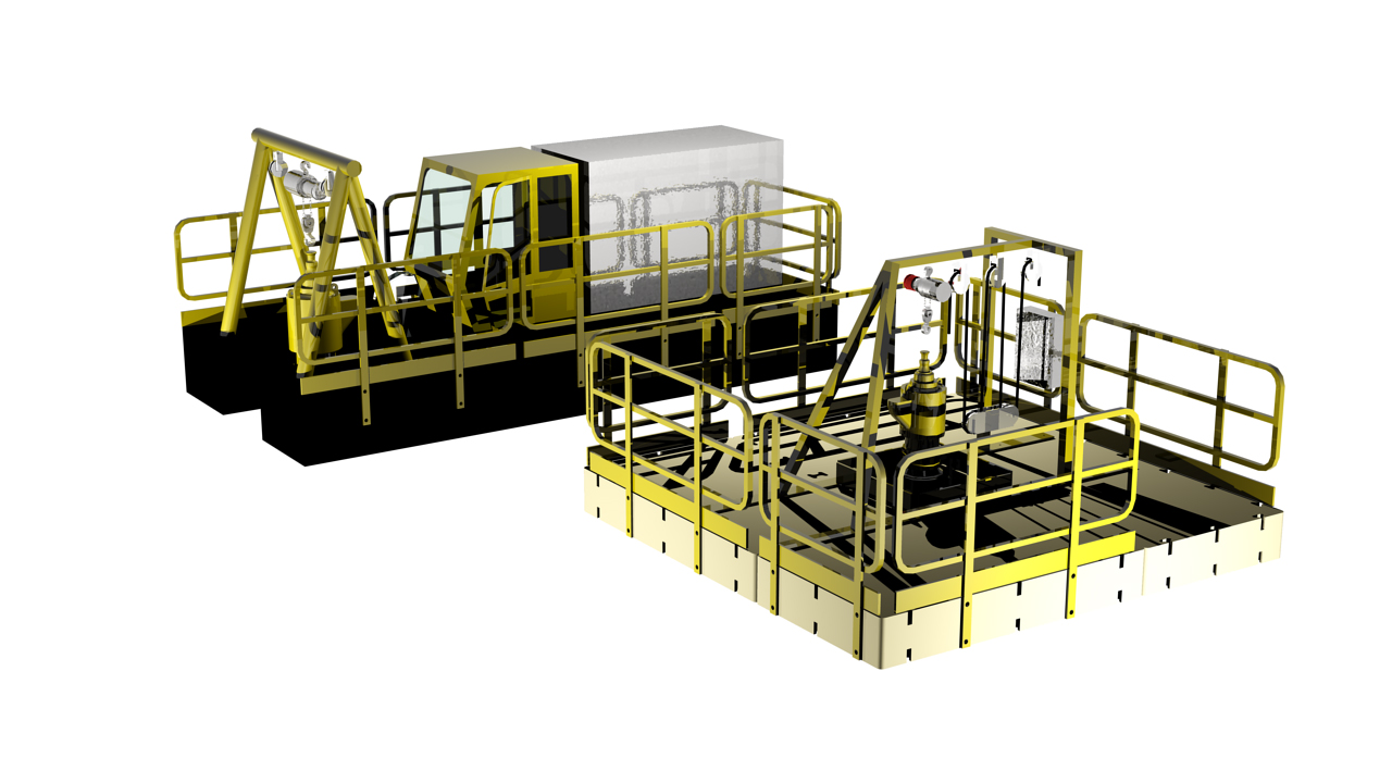 Dragas de Sucção e Recalque com Bombas Submersíveis de Dragagem.